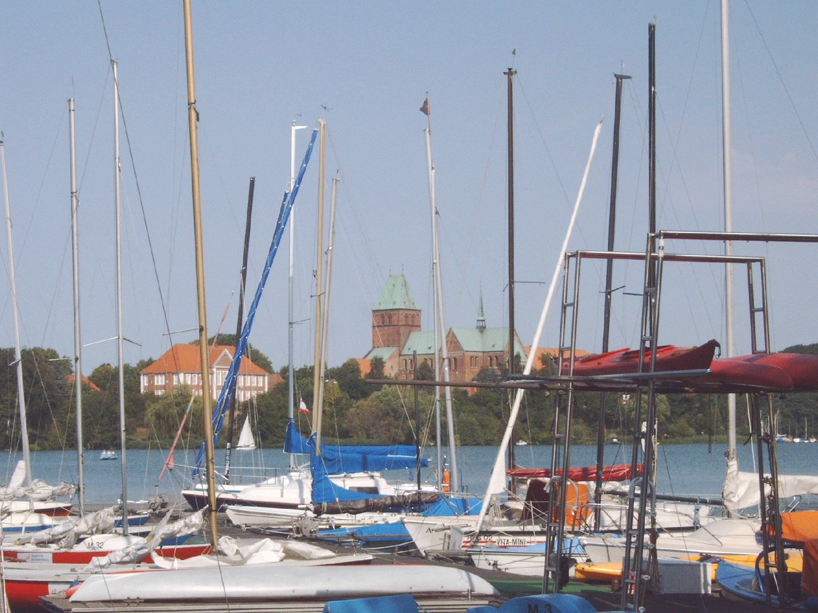 Die Dominsel in Ratzeburg mit Dom und „Herrenhaus“ Aufnahme: 25.7.2004 Url